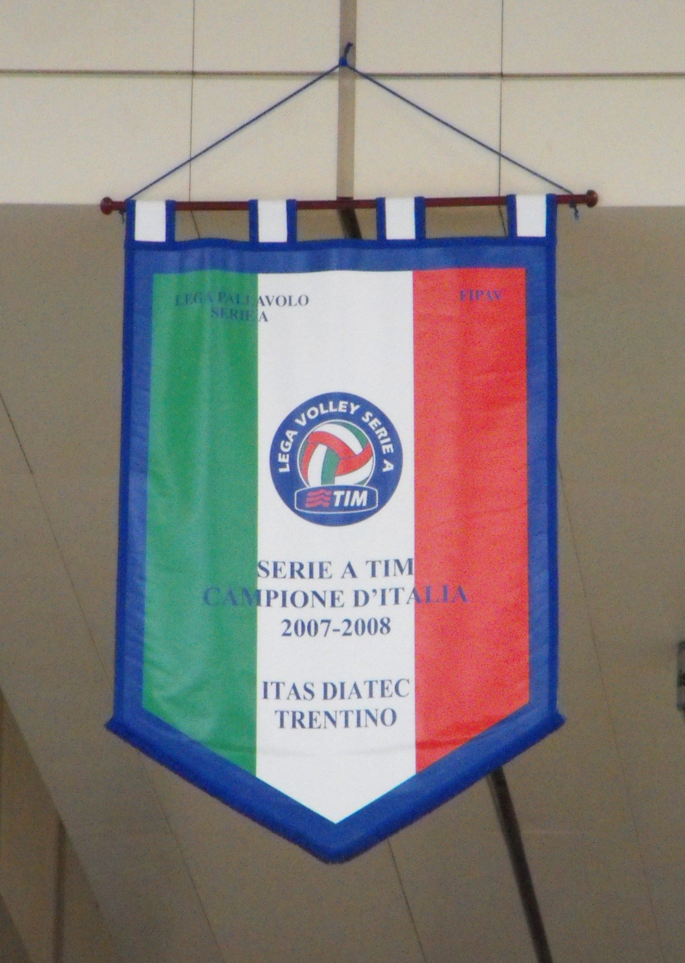 Gonfalone appeso al PalaTrento che testimonia la vittoria del campionato 2007-2008 di volley da parte della Trentino Volley